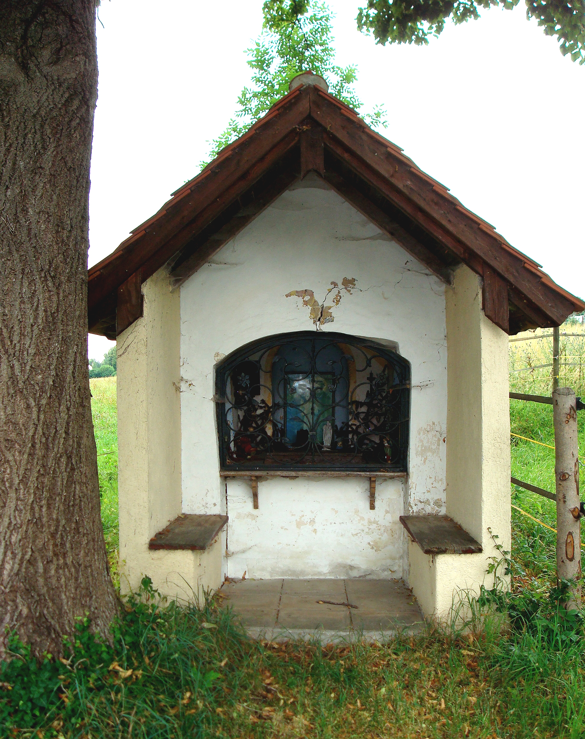 Berg, OT Sibichhausen. Kleine Wegkapelle aus dem 18. Jahrhundert.